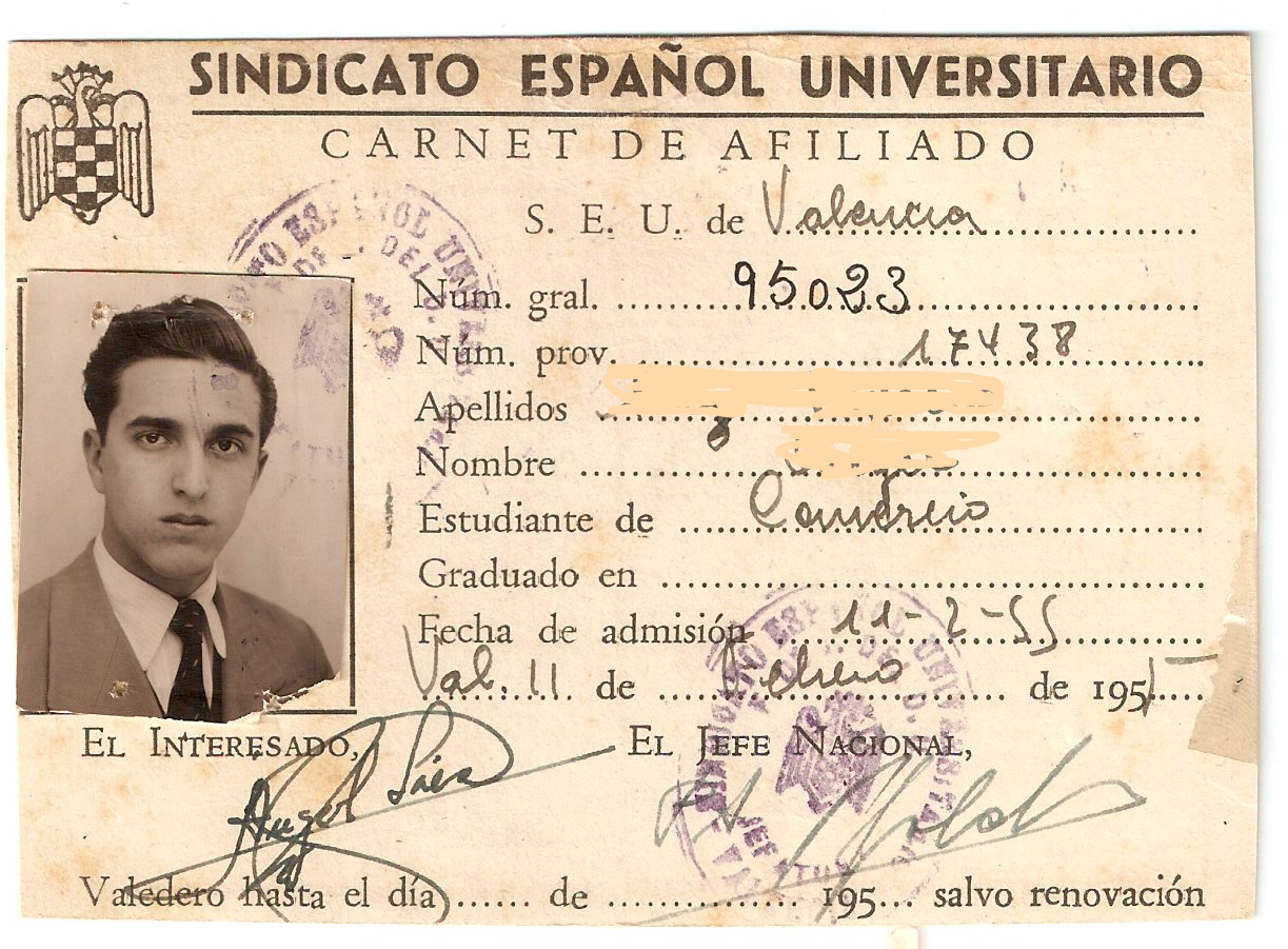 Carnet del Sindicato Español Universitario. La pertenencia al SEU era obligatoria para realizar estudios universitarios.